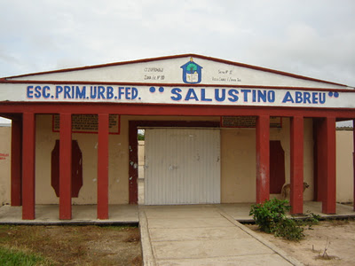 Puerta de entrada a la Escuela Primaria Urbana Federal Slustino Abreu en Villa Chablé